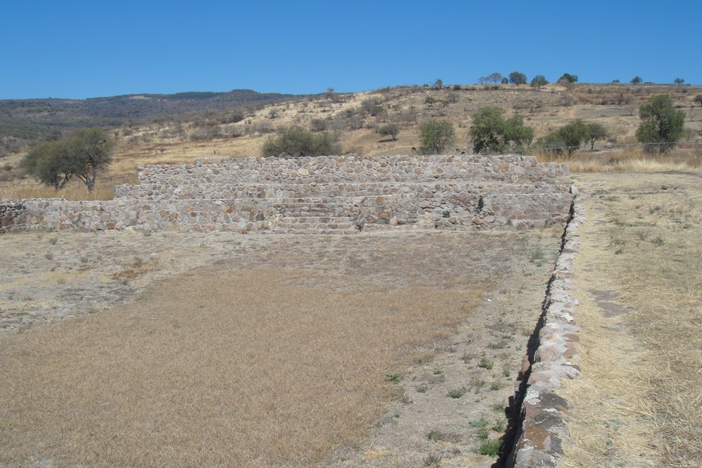 Template:Huandacareo, sunken patio